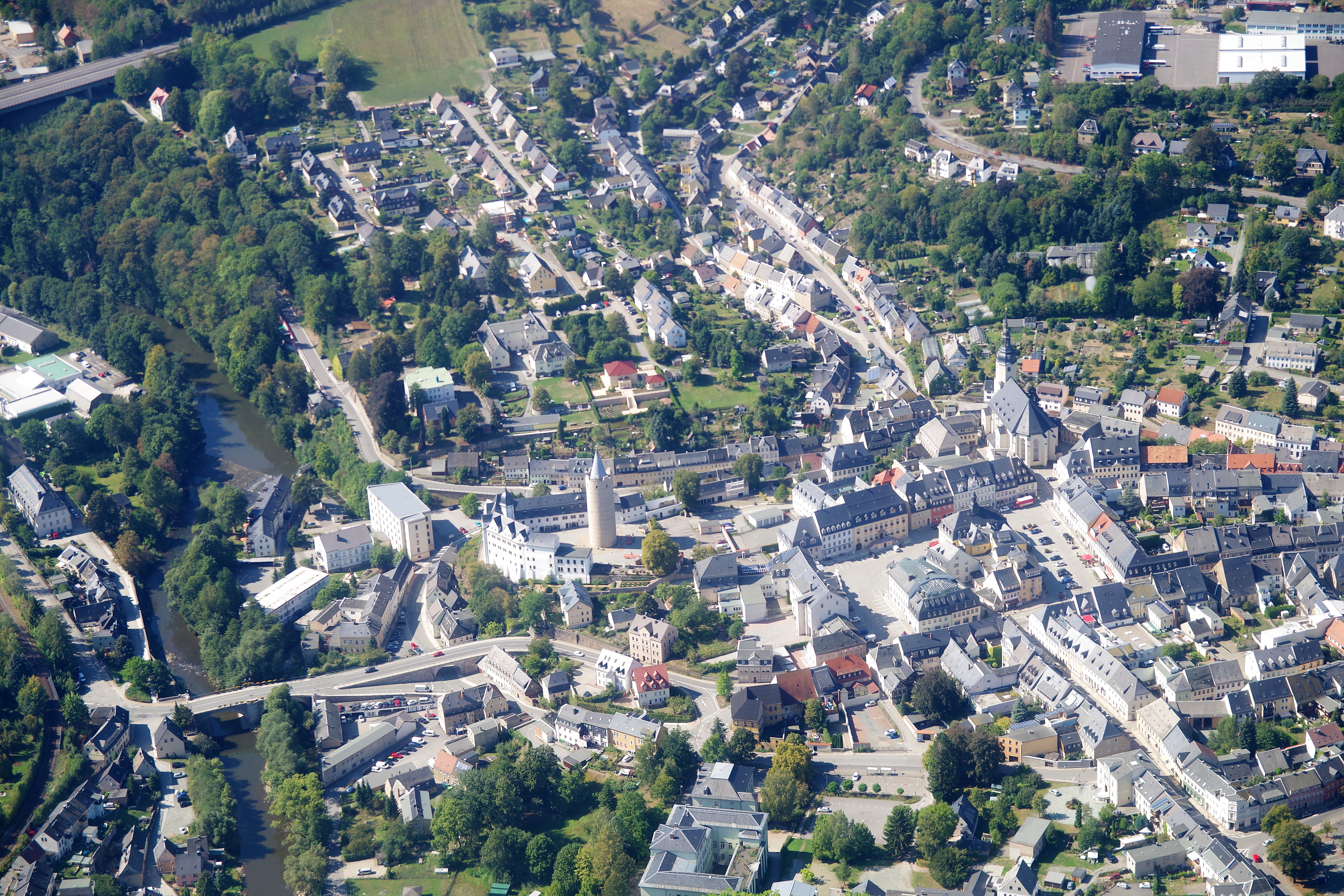 Zschopau